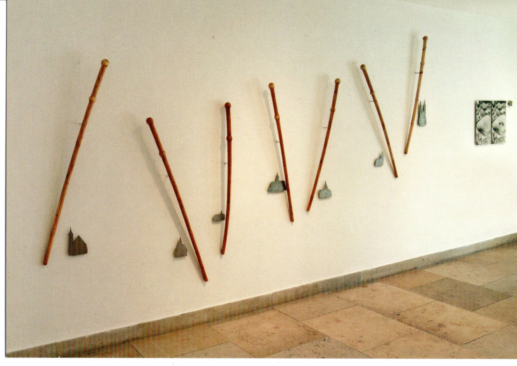 Installation Camino 2001